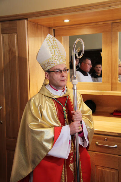 Abp Marek Solczyński